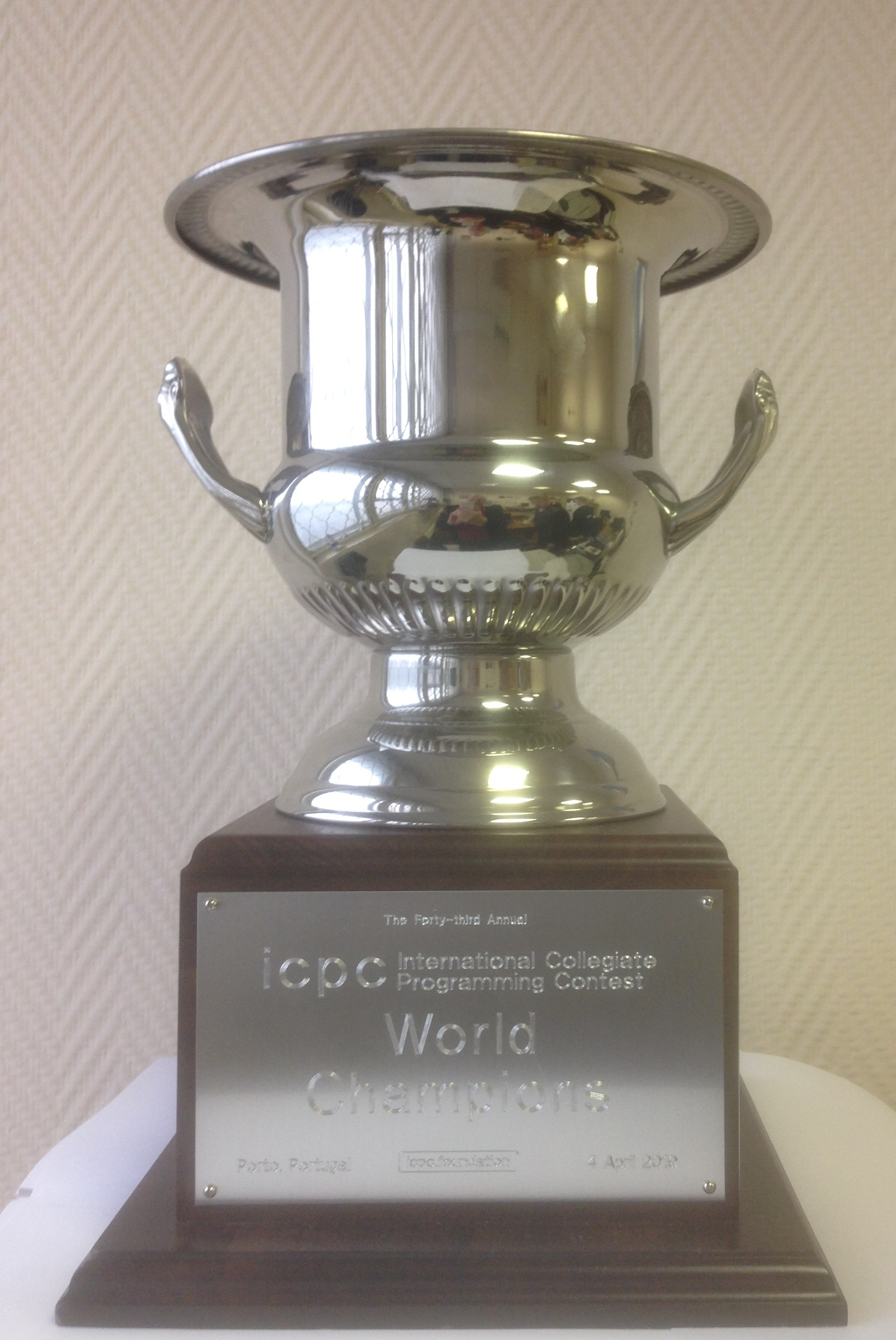 Чемпионский кубок Чемпионата мира по программированию ICPC-2019, завоёванный командой МГУ.